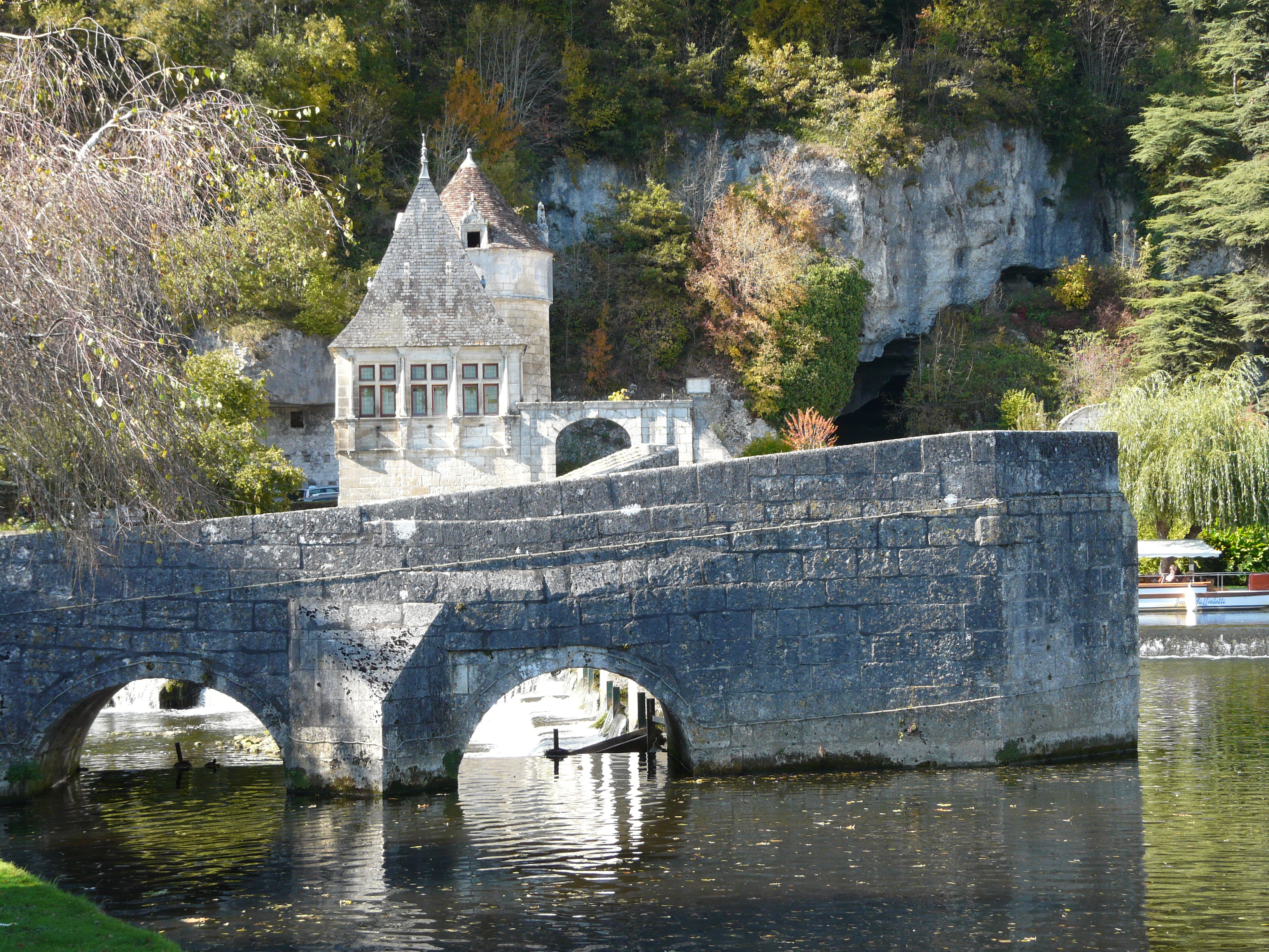 Le pont coudé devant le pavillon Renaissance, abbaye Saint-Pierre, Brantôme, Dordogne, France